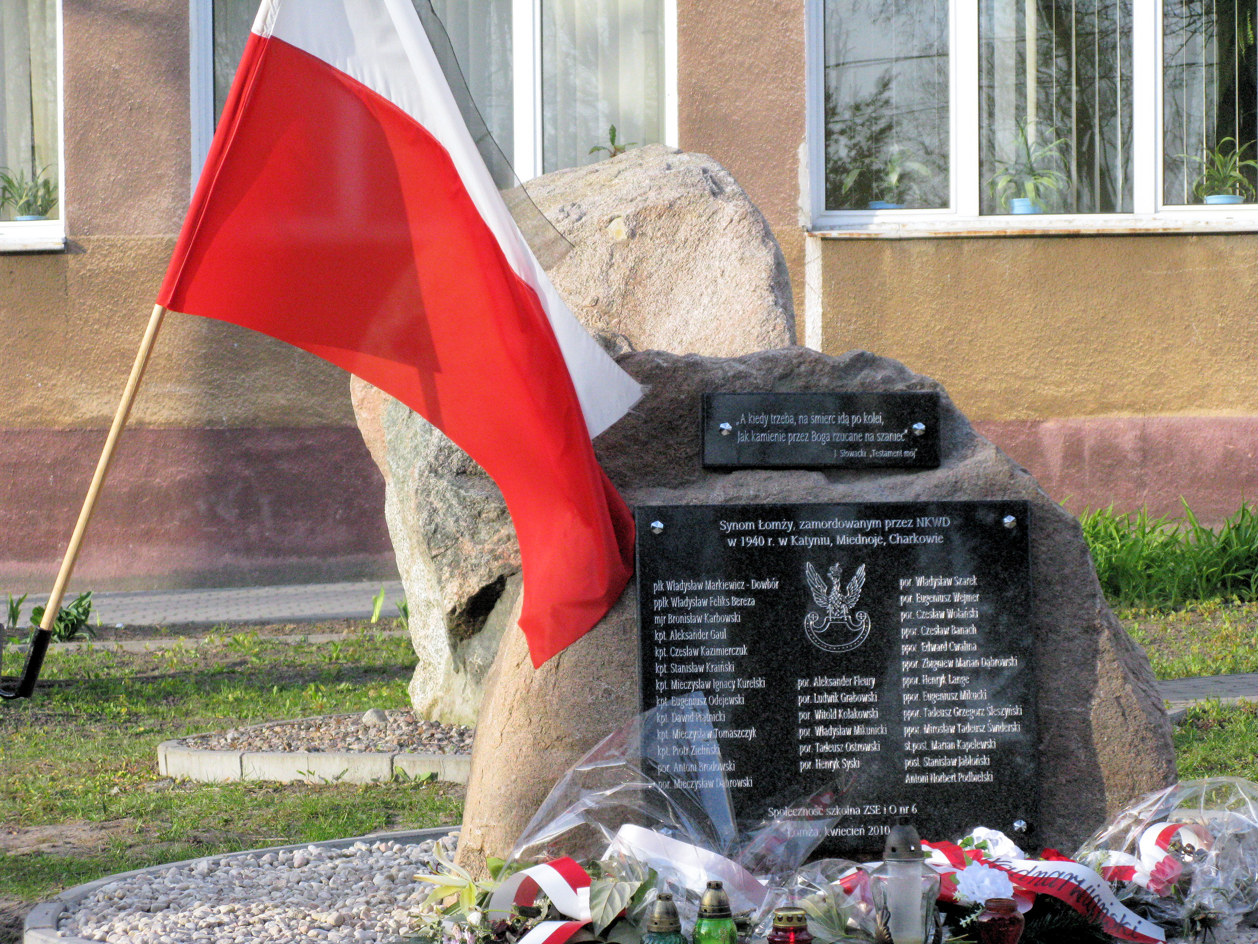 Pomnik ku czci żołnierzy łomżyńskich zamordowanych przez NKWD w 1940 roku w Katyniu, Miednoje i Charkowie; Pomnik zlokalizowany jest na terenie Zespołu Szkół Ekonomicznych w Łomży